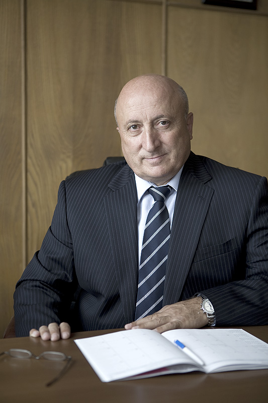 Հոգեբանական գիտությունների դոկտոր